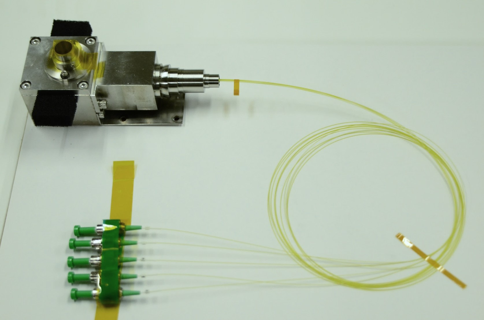 OAM